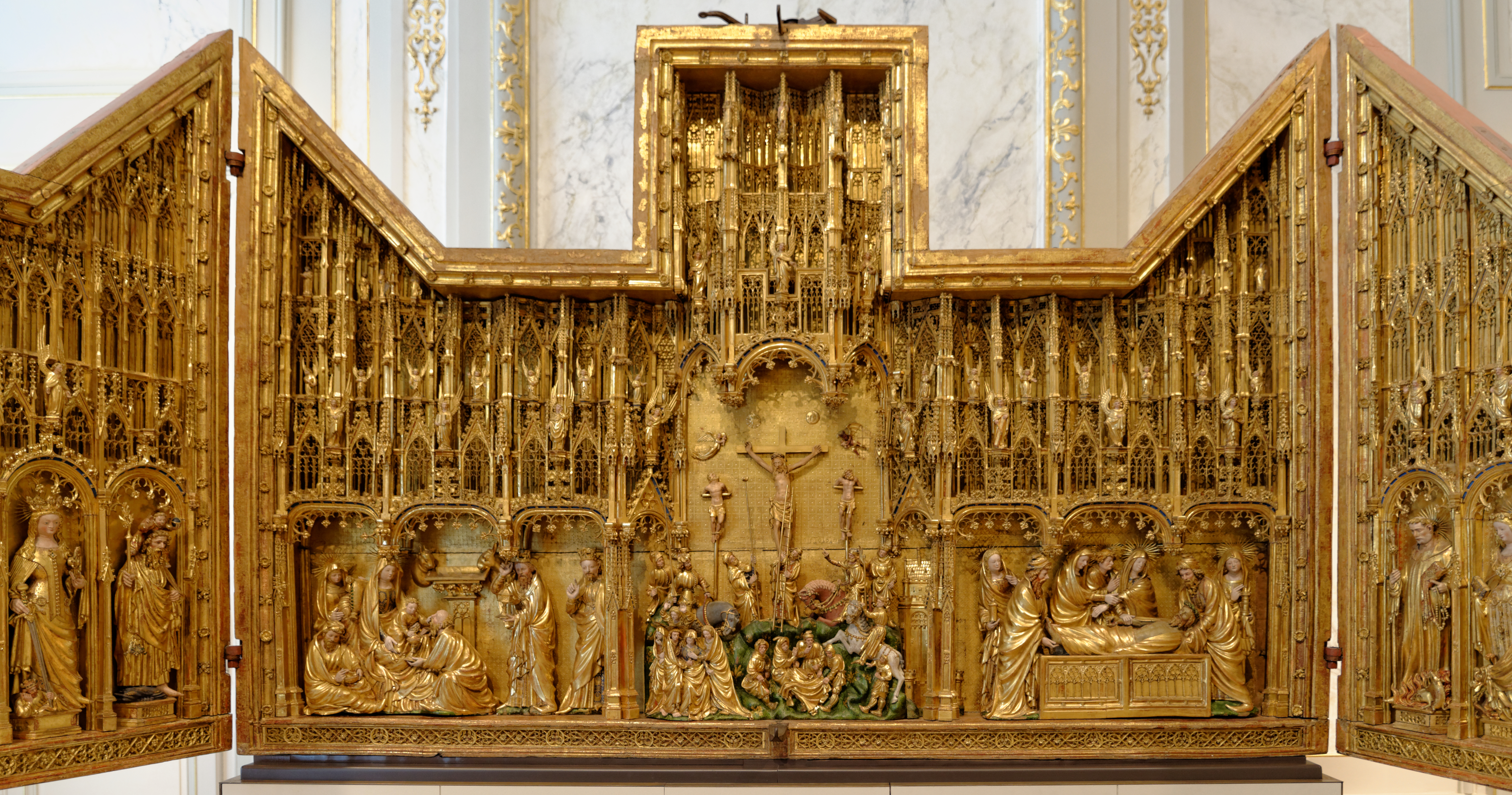 Le retable de la crucifixion. Jacques de Baerze, sculpteur actif à Termonde à la fin du XIV eme siècle et Melchior Broederlam (fl. 1381–1409) Description Flemish painter and draughtsman Work periodcirca 1380–1410Work locationYpres (1381–1409), Dijon (1389, 1399), Paris (1390, 1395)Authority control GND: 118660152 WP-Person , peintre actif à Ypres de 1381 à 1401. Au centre : adoration des Mages, Crucifixion et mise au tombeau. Sur le volet de gauche : Saint Georges, sainte Madeleine, saint Jean l'Evangéliste, sainte Catherine et saint Christophe. Sur le volet de droite : Saint Antoine, saine Marguerite, saint Roi, sainte Barbe et saint Josse. Au revers panneaux peints. A gauche L'Annonciation et la Visitation. A droite la Présentaton au Temple et la Fuite en Egypte. Commandé pour la chartreuse de Champmol en 1390, il a été réalisé en Flandre sculpté en 1391 et peint de 1393 à 1399. Il a été mis en place en 1399. Musée des Beaux-Arts de Dijon Native nameMusée des Beaux-Arts de DijonLocationDijonCoordinates47° 19′ 17.89″ N, 5° 02′ 32.69″ E Established1799Website control VIAF: 124290561 BnF: cb118649638 SUDOC: 026393883 Museofile: M0137 .